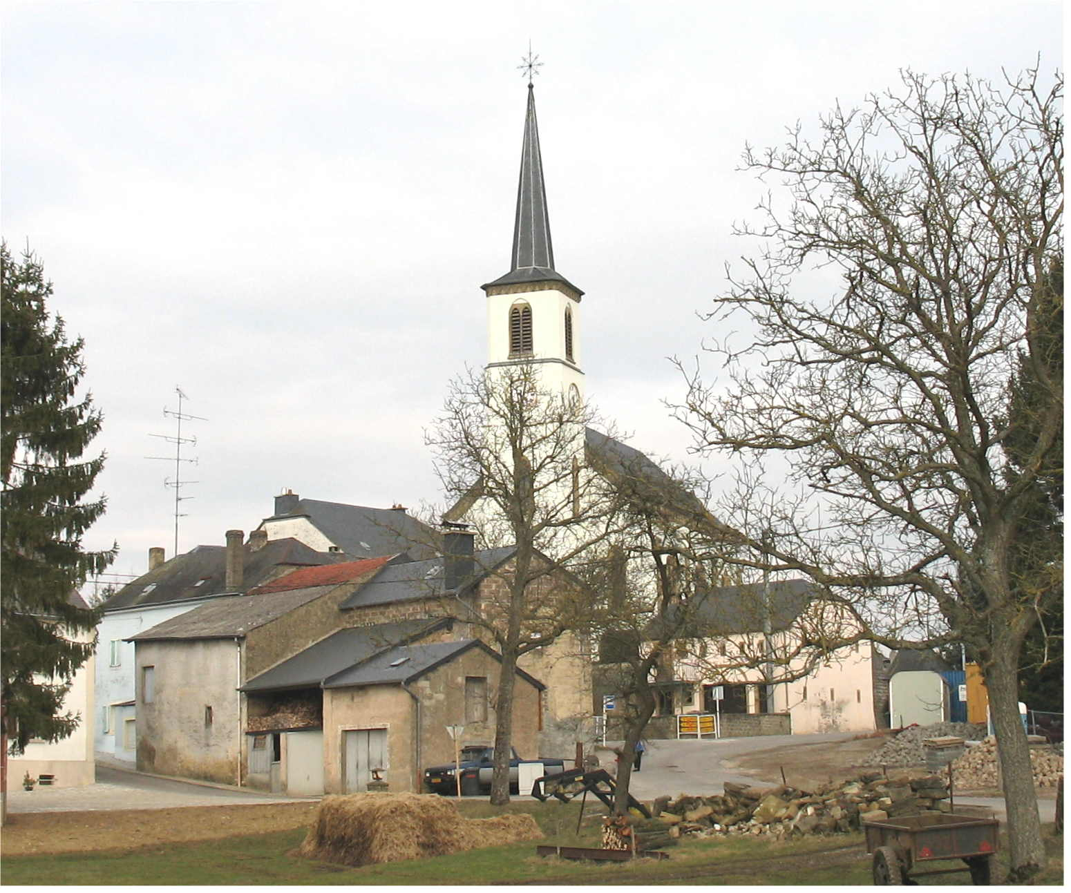 Sujet: Hemstel Source: Eege Foto Johnny Chicago (MÃ¤erz 2006) Lizenz